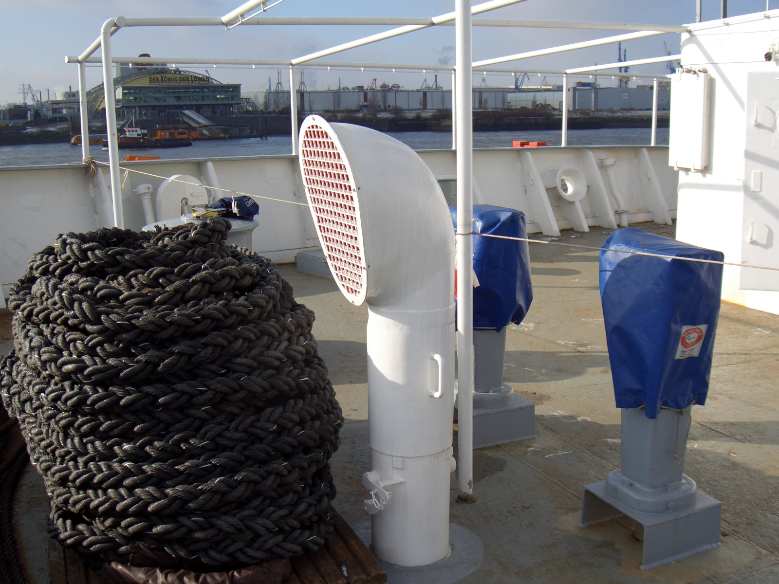 Hutze